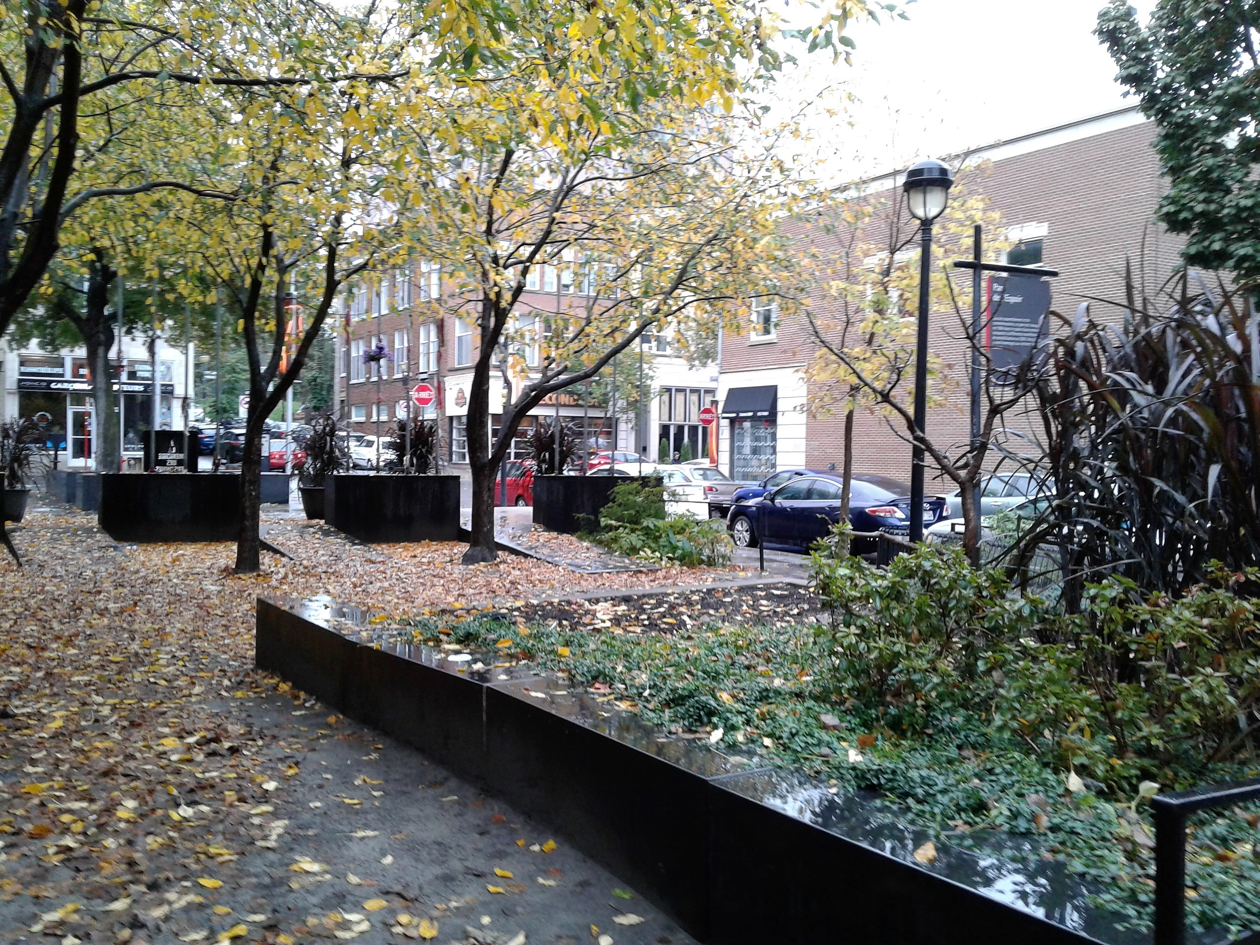 Parc de l'Espoir, à l'angle sud-ouest des rues Sainte-Catherine et Panet, Montréal